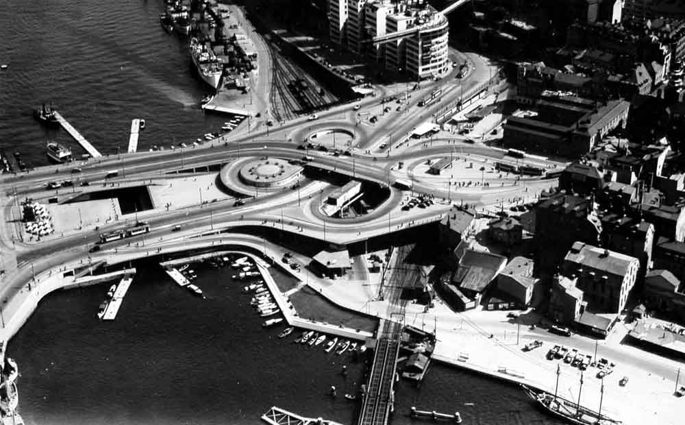 Slussen i Stockholm, flygfoto